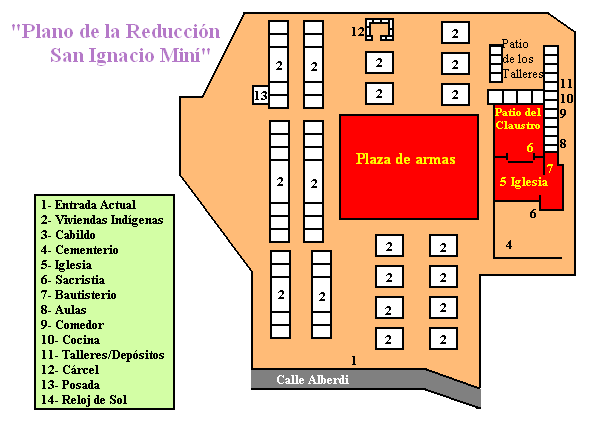 Creada por mí. Plano de la reducción de San ignacio